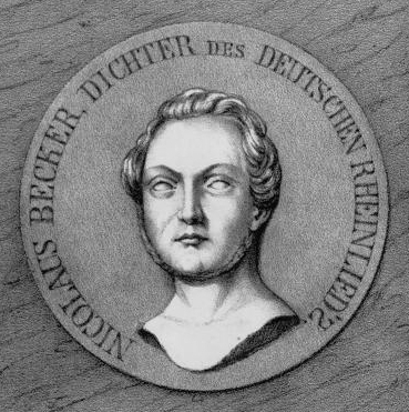 Der Dichter des Rheinliedes ("Sie sollen ihn nicht haben") Nikolaus Becker (1809 -1845)